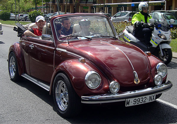 VW Beetle from Madrid